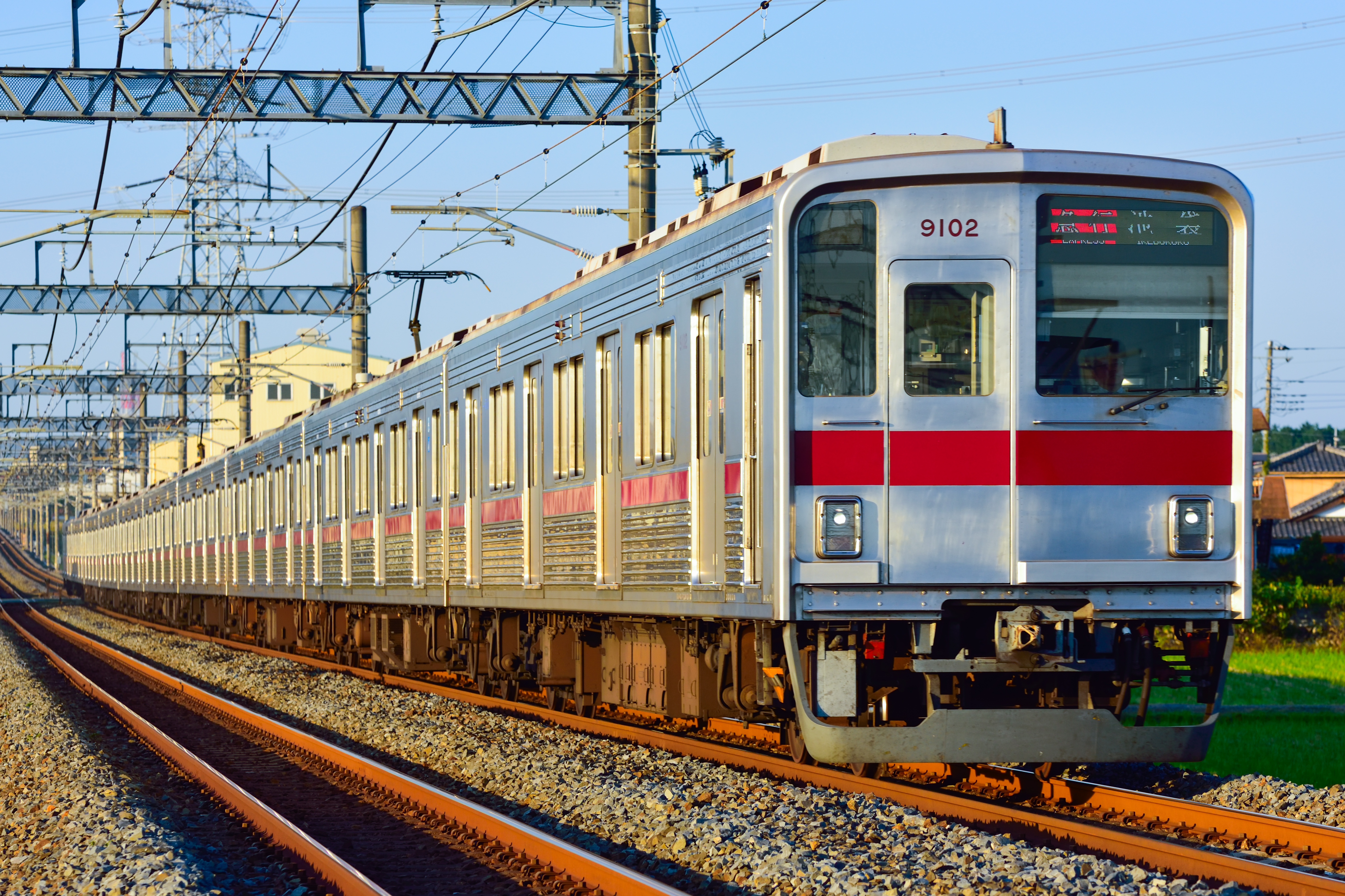 東武東上線9000系。高坂～東松山。